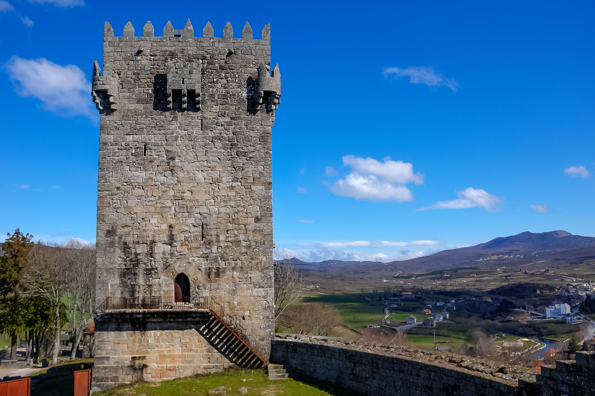 Portugal